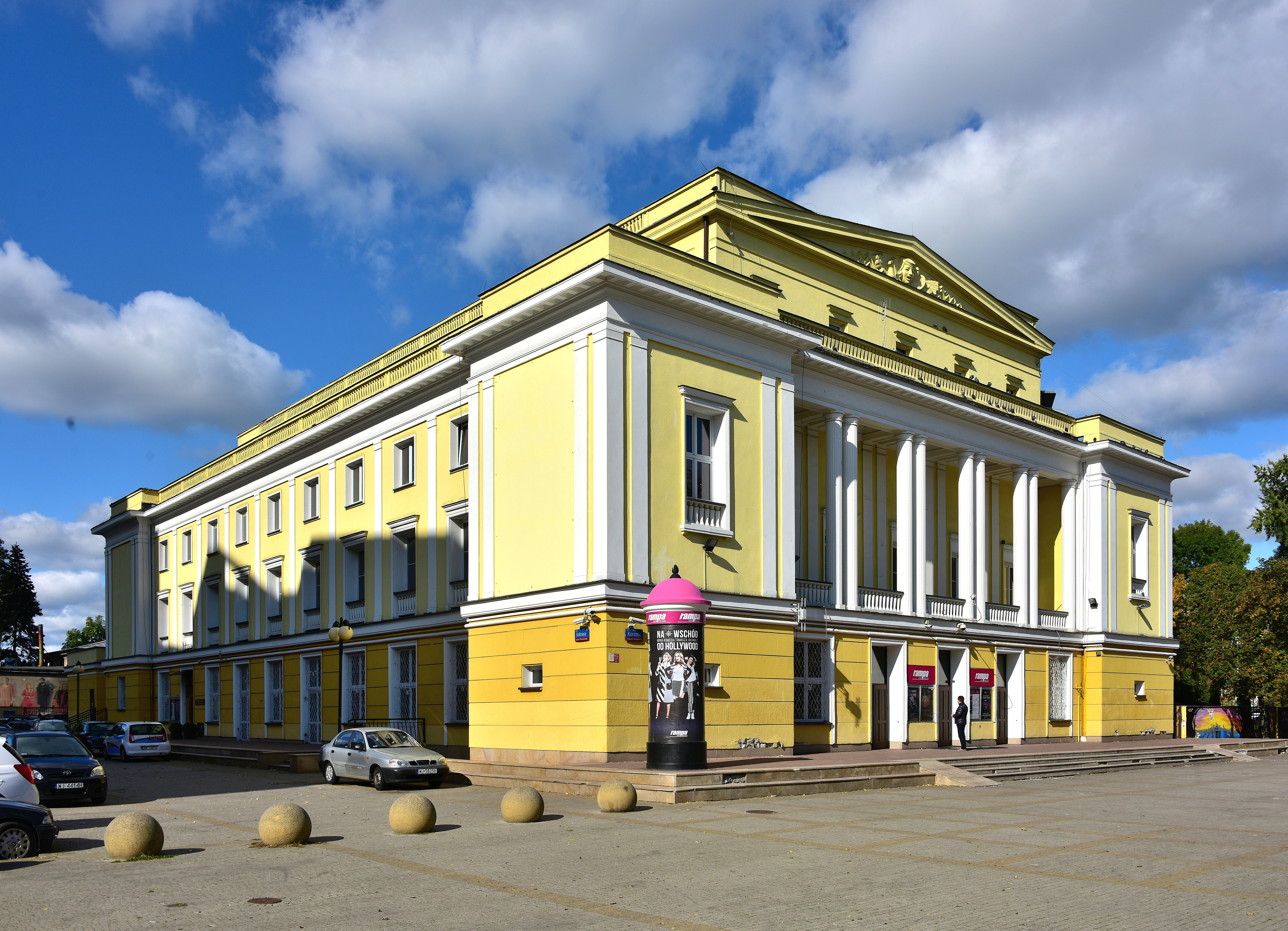 Teatr Rampa w Warszawie